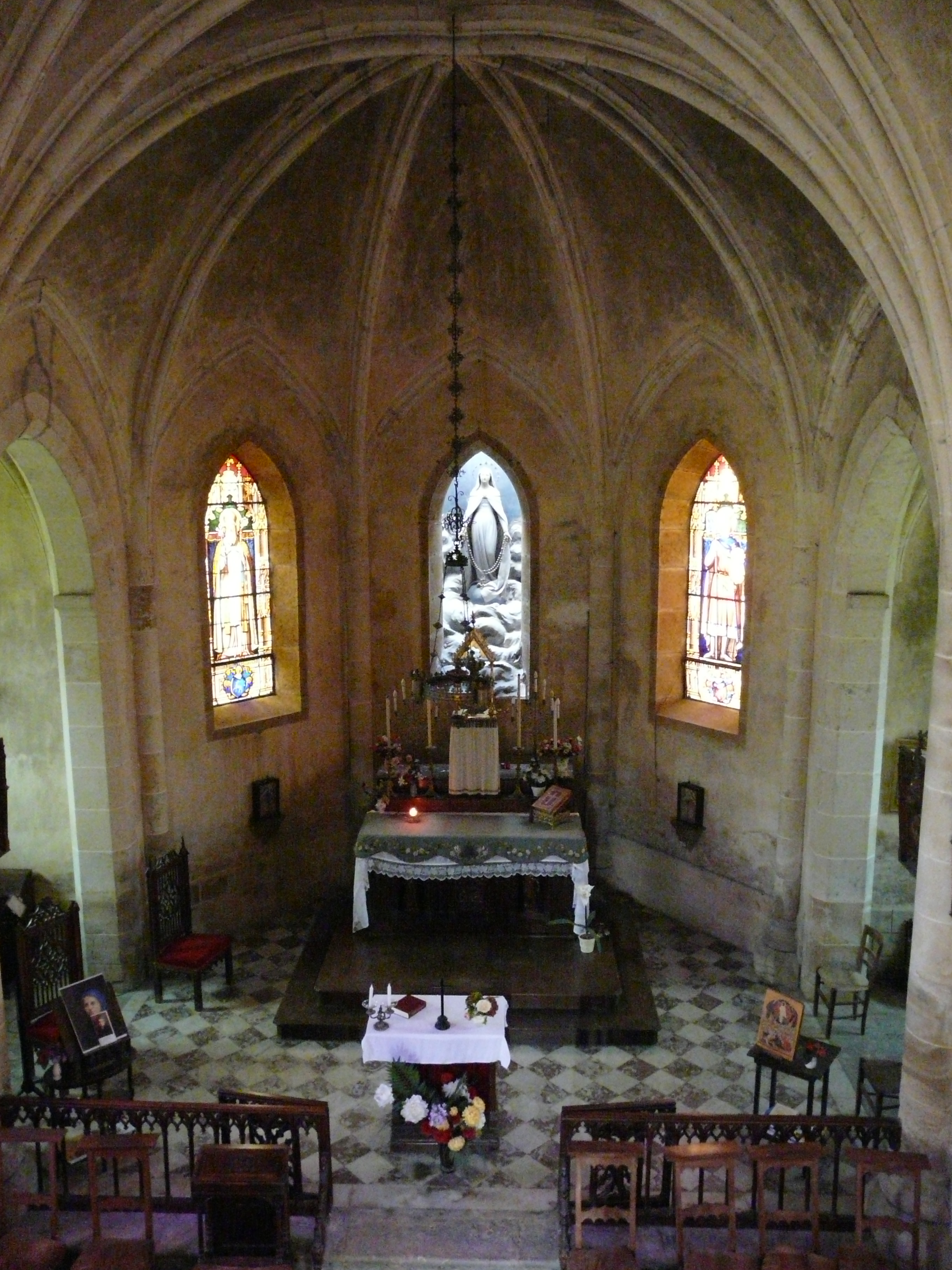 Chapelle de Villemolin, édifiée en 1830, ISMH 1978, vitraux de Lobin de Tours